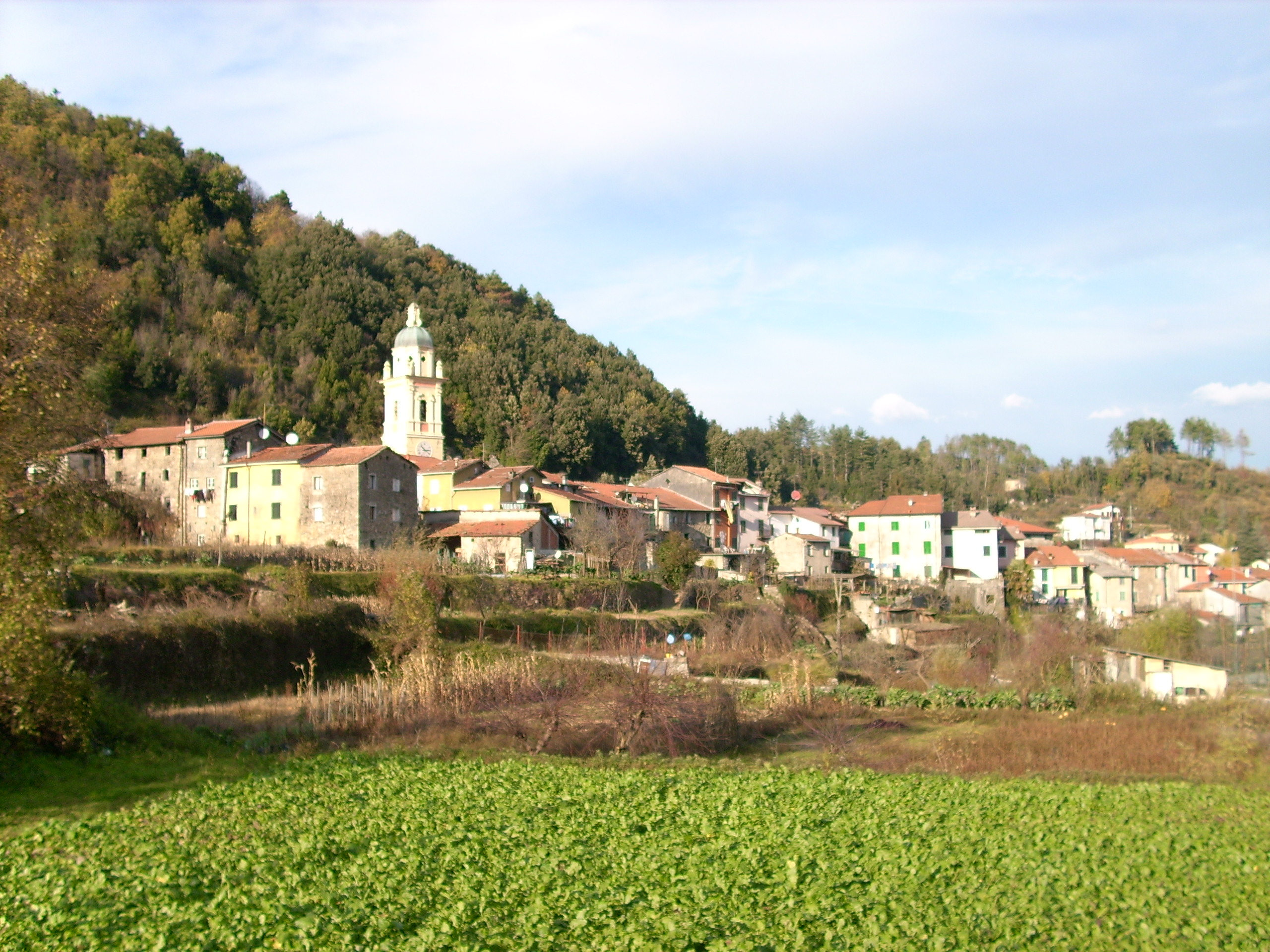 Pignone, Liguria, Italia